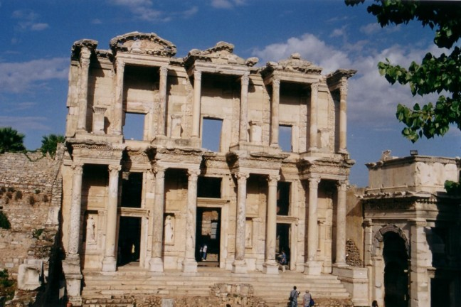 Ephesus